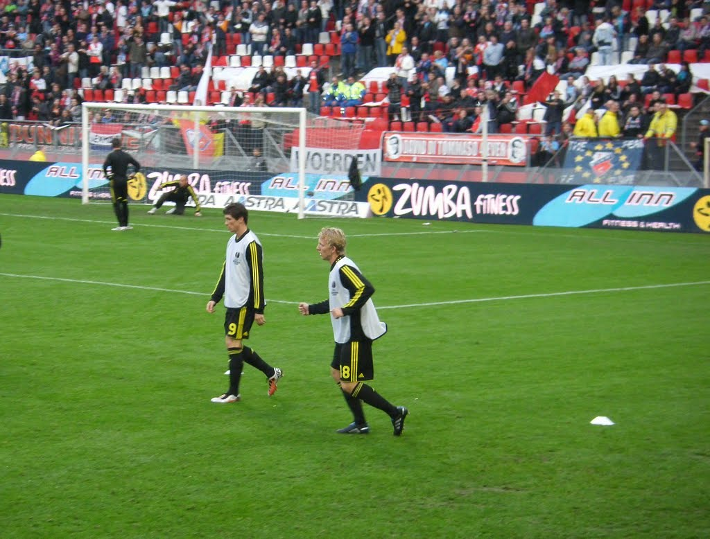 Dirk Kuyt and Fernando Torres - FC Utrecht v Liverpool FC